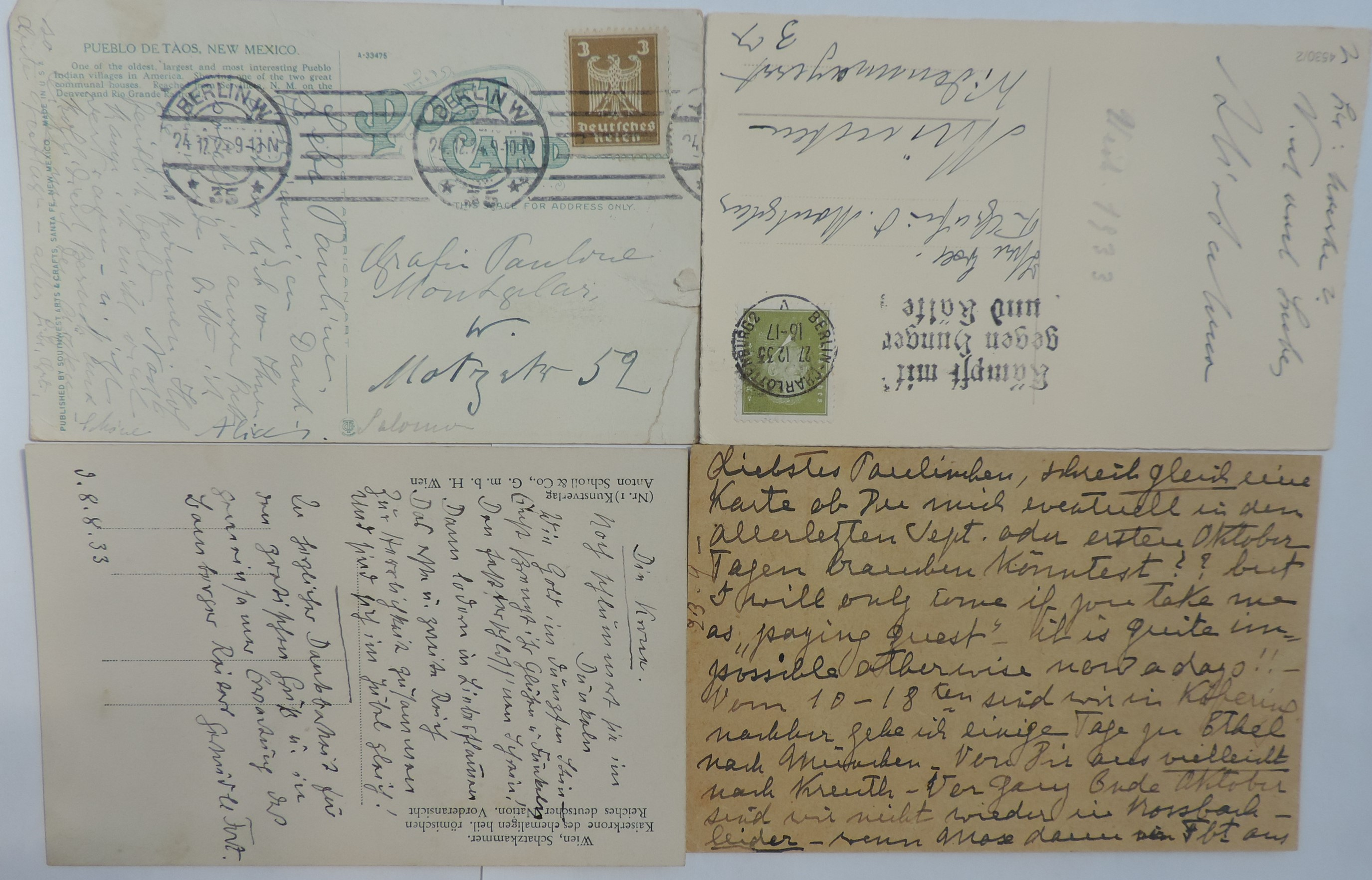 Postkarten aus den 1930er Jahren von Alice Salomon und Gertrud von le Fort,archiviert im Ida-Seele-Archiv